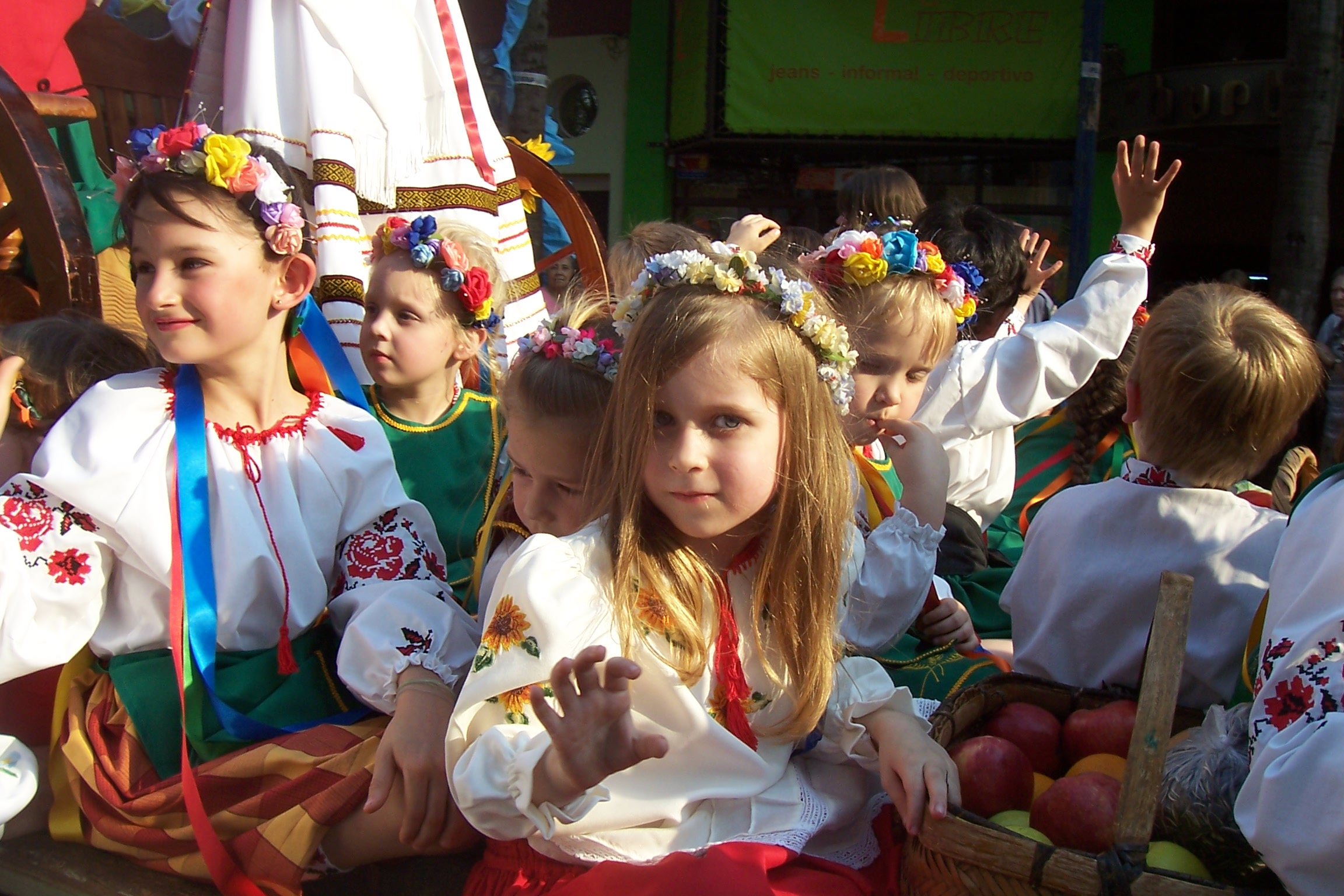 Niños descendientes de ucranianos desfilando en la Fiesta Nacional del Inmigante de Oberá. Año 2007.